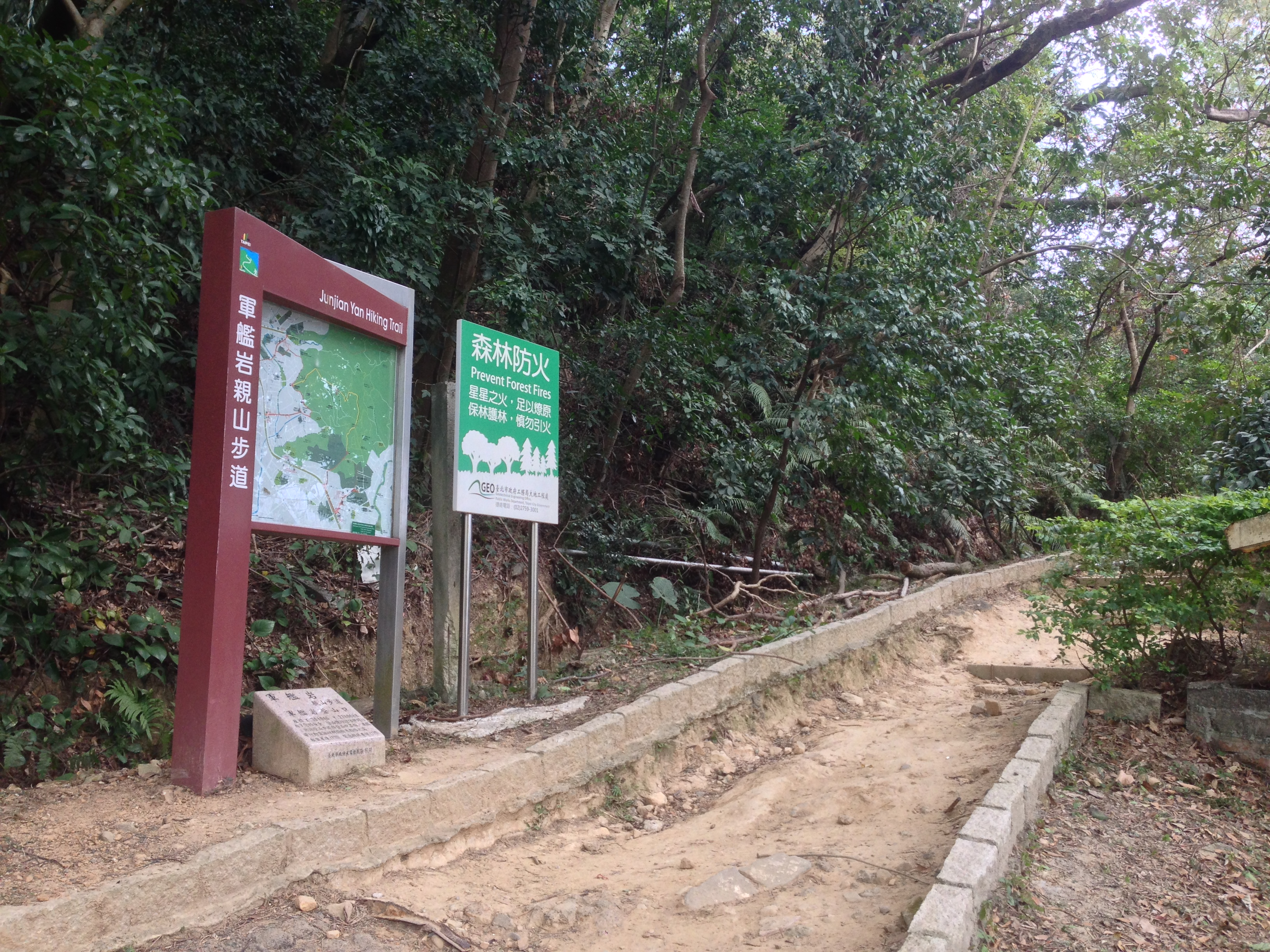 軍艦岩親山步道入口